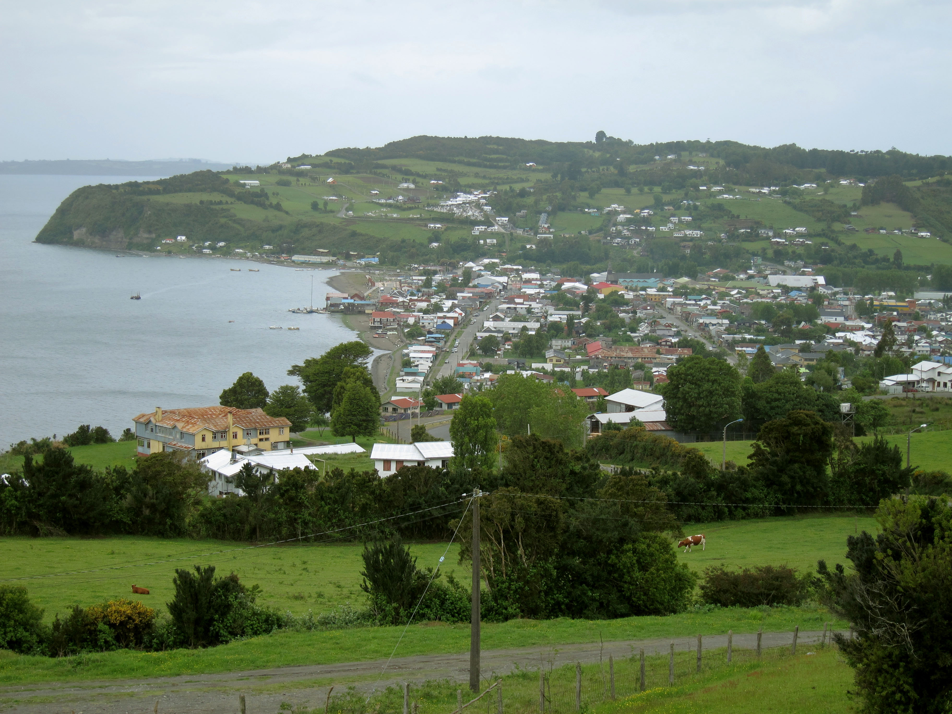 View from Achao Chiloé Mirador Alto la Paloma